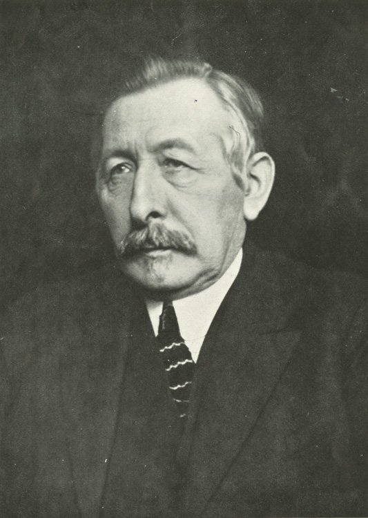 Pieter Jelles Troelstra in 1926